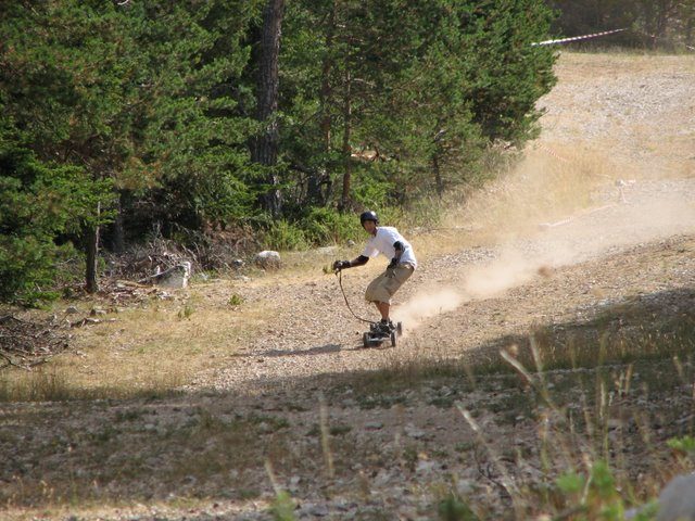 championnat de france de mountain board de descente à la moulière (06750) le 31 août 2008